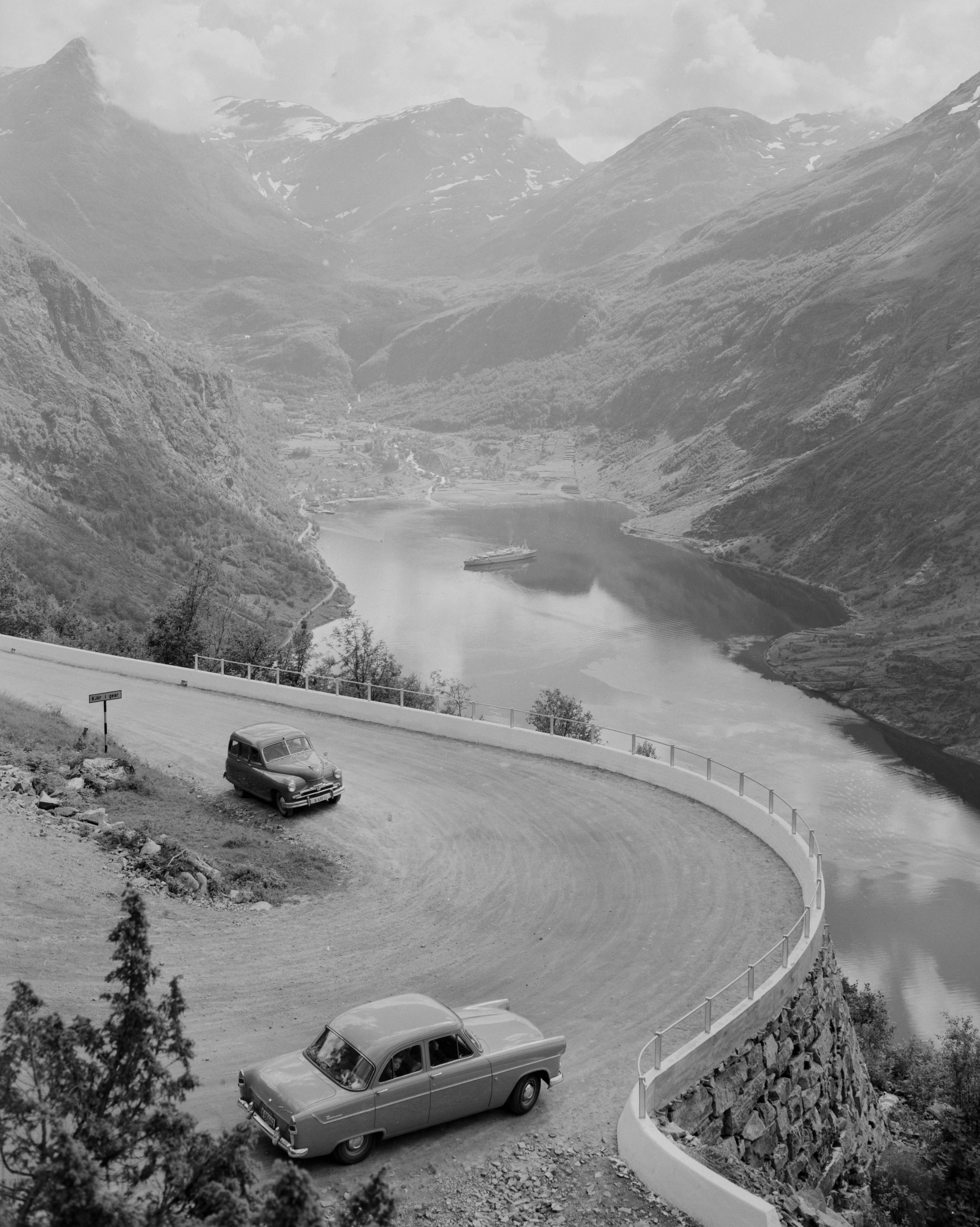 Bildet er hentet fra Nasjonalbibliotekets bildesamling Geiranger,Geirangerfjorden,Ørnesvingen, Stranda, Møre og Romsdal